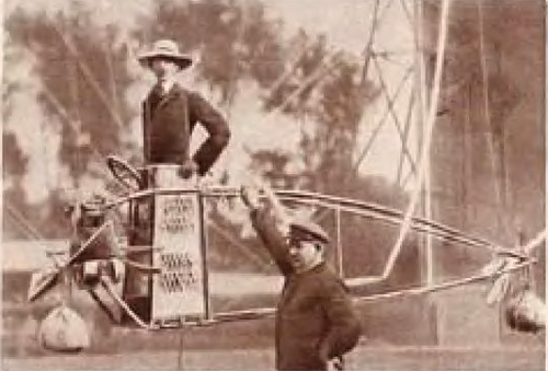 Santos-Dumont dans la nacelle de son dirigeable et un mécanicien à côté.